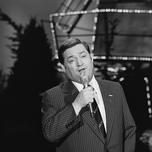 Willy Alberti in Op volle toeren in 1980